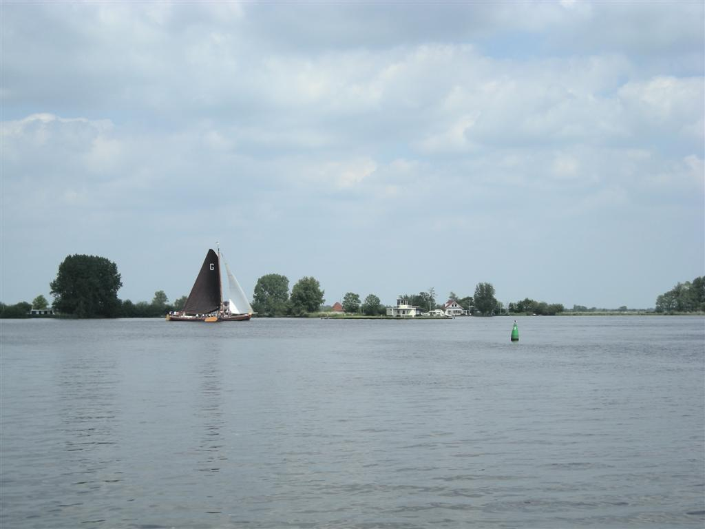 skûtsje op het Pikmar (Pikmeer); een meer ten oosten van de plaats Grou.